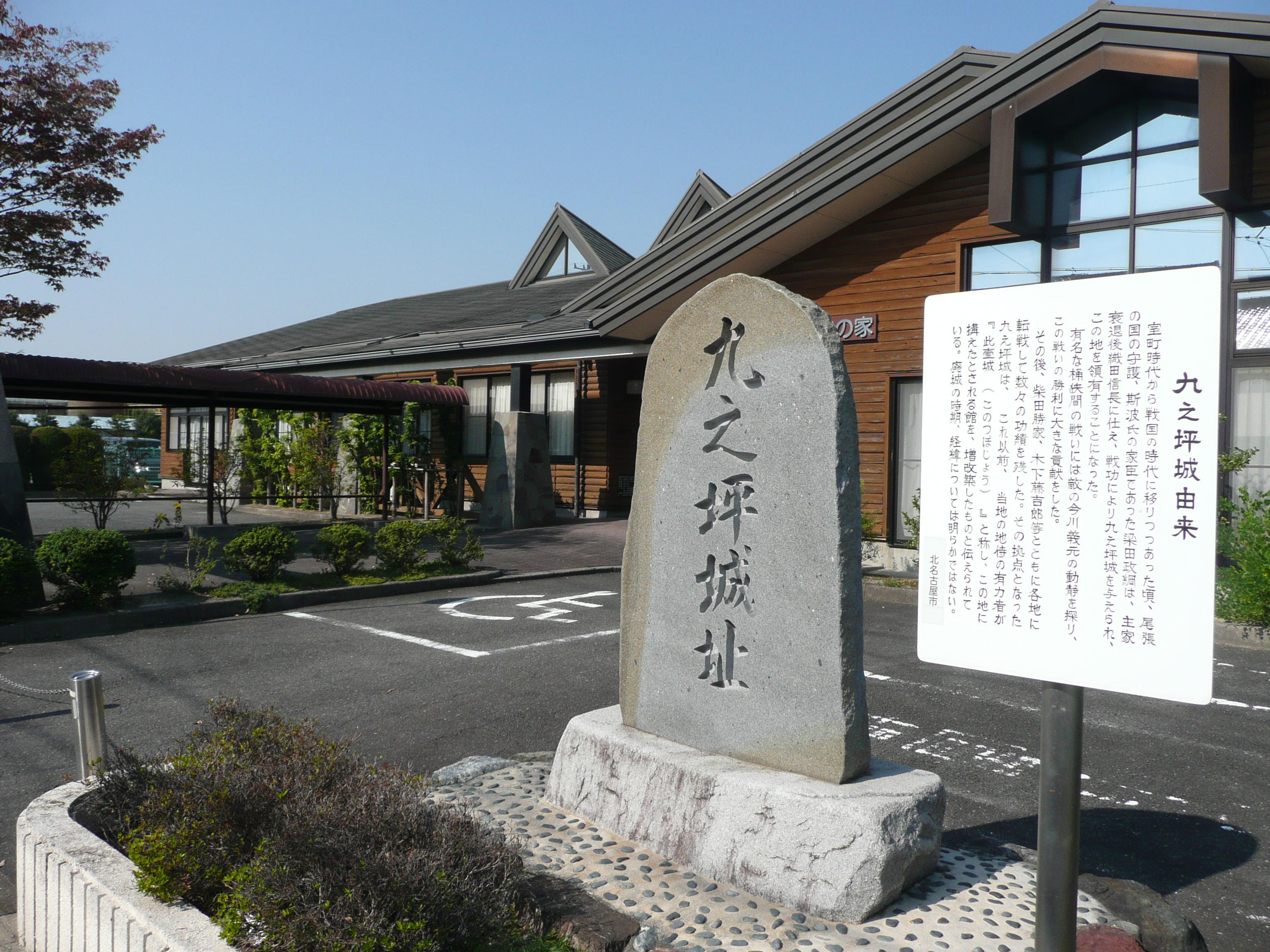 九之坪城の石碑